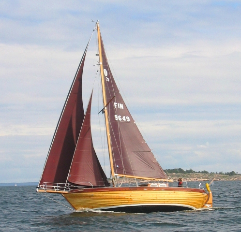 SuurScylla Ottiliana täysissä purjeissa